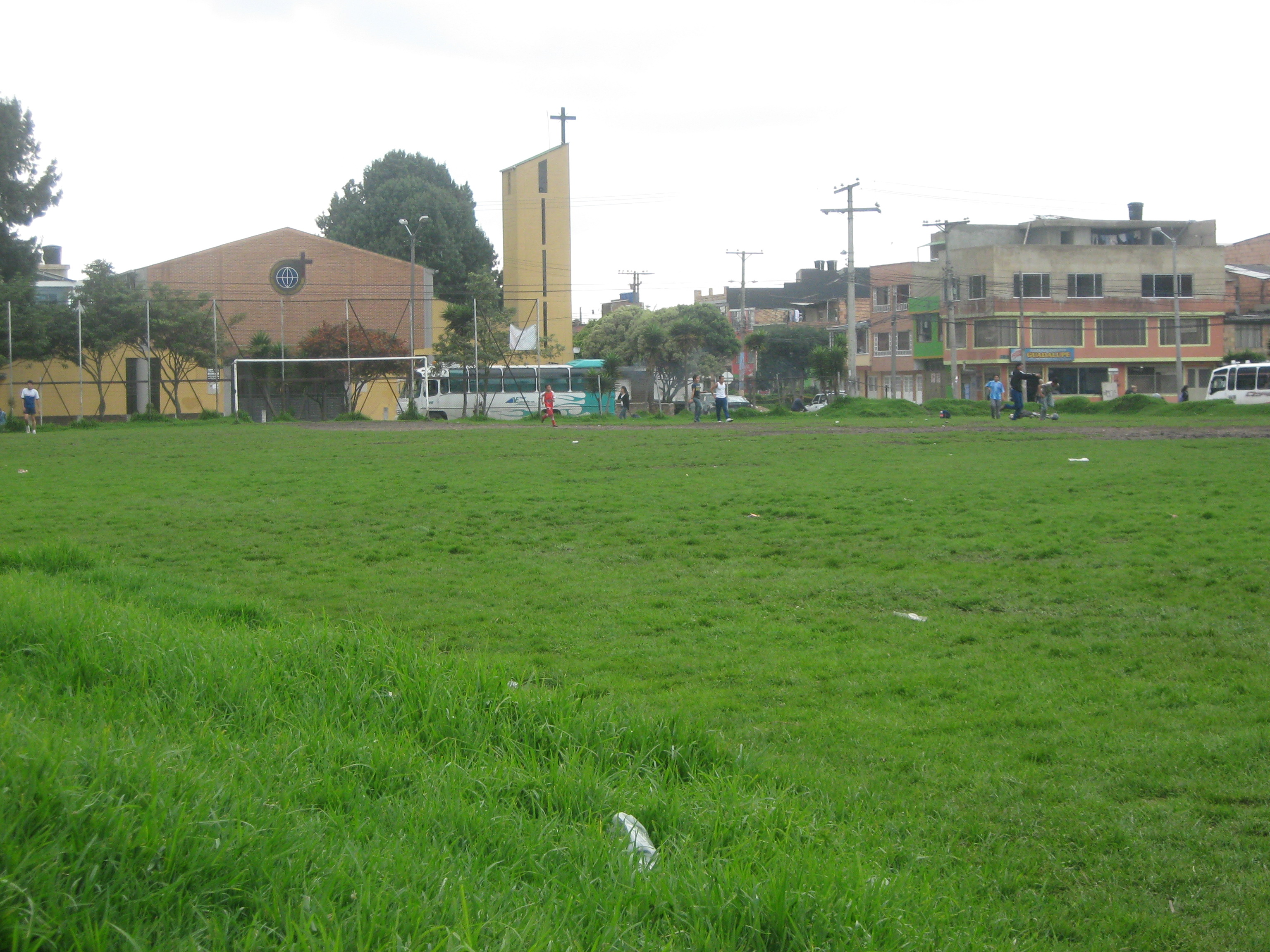 subst: licencia image